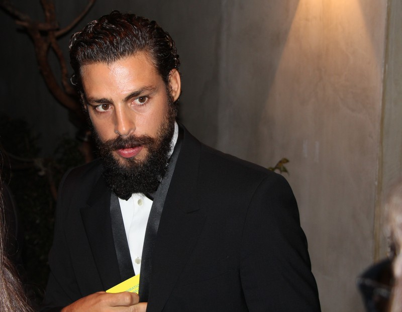 14 - Caua Reymond